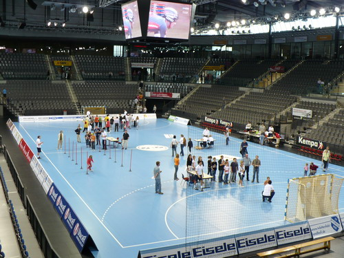 Innenansicht Porsche Arena in Stuttgart